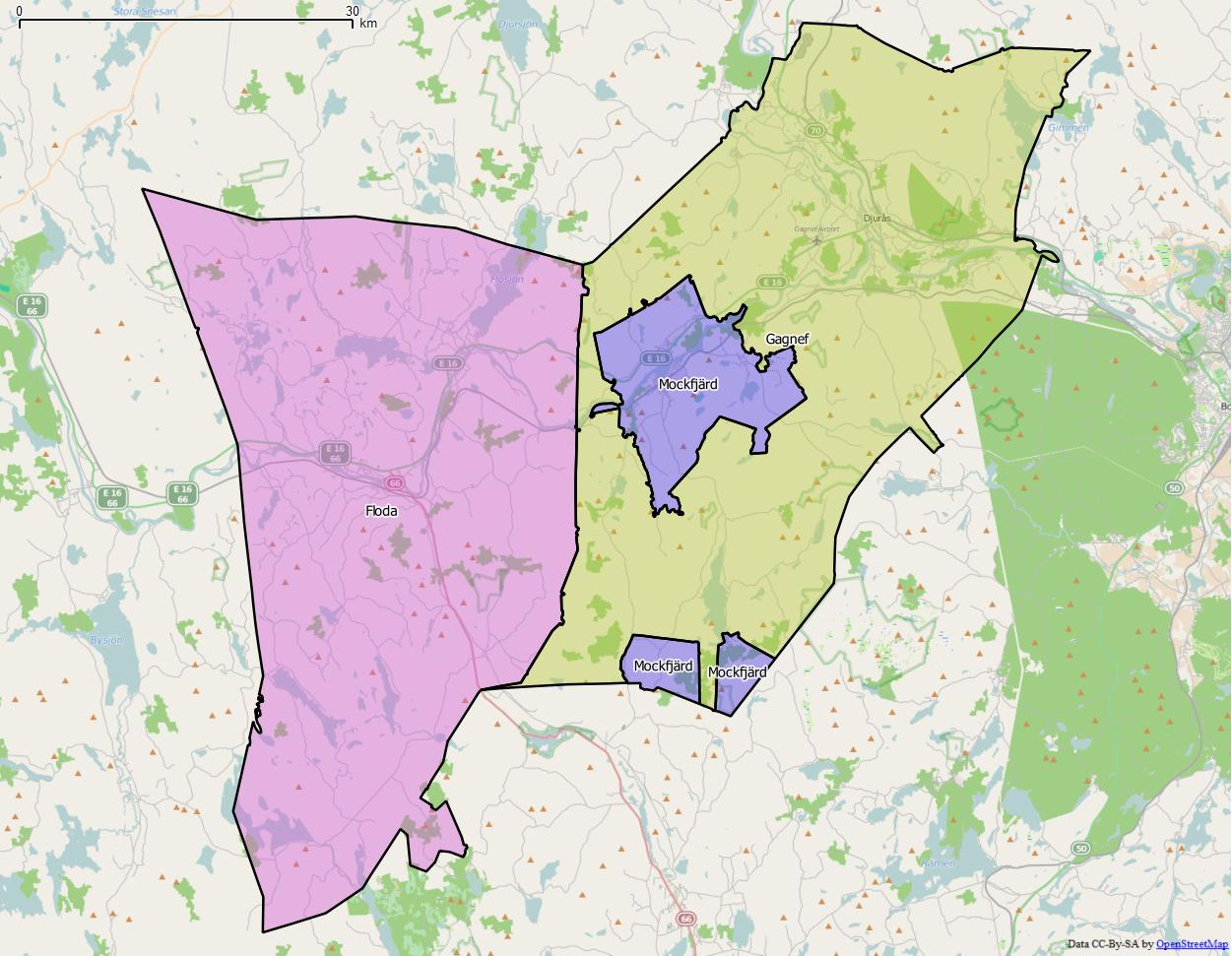 Distriktsindelningen i Gagnefs kommun